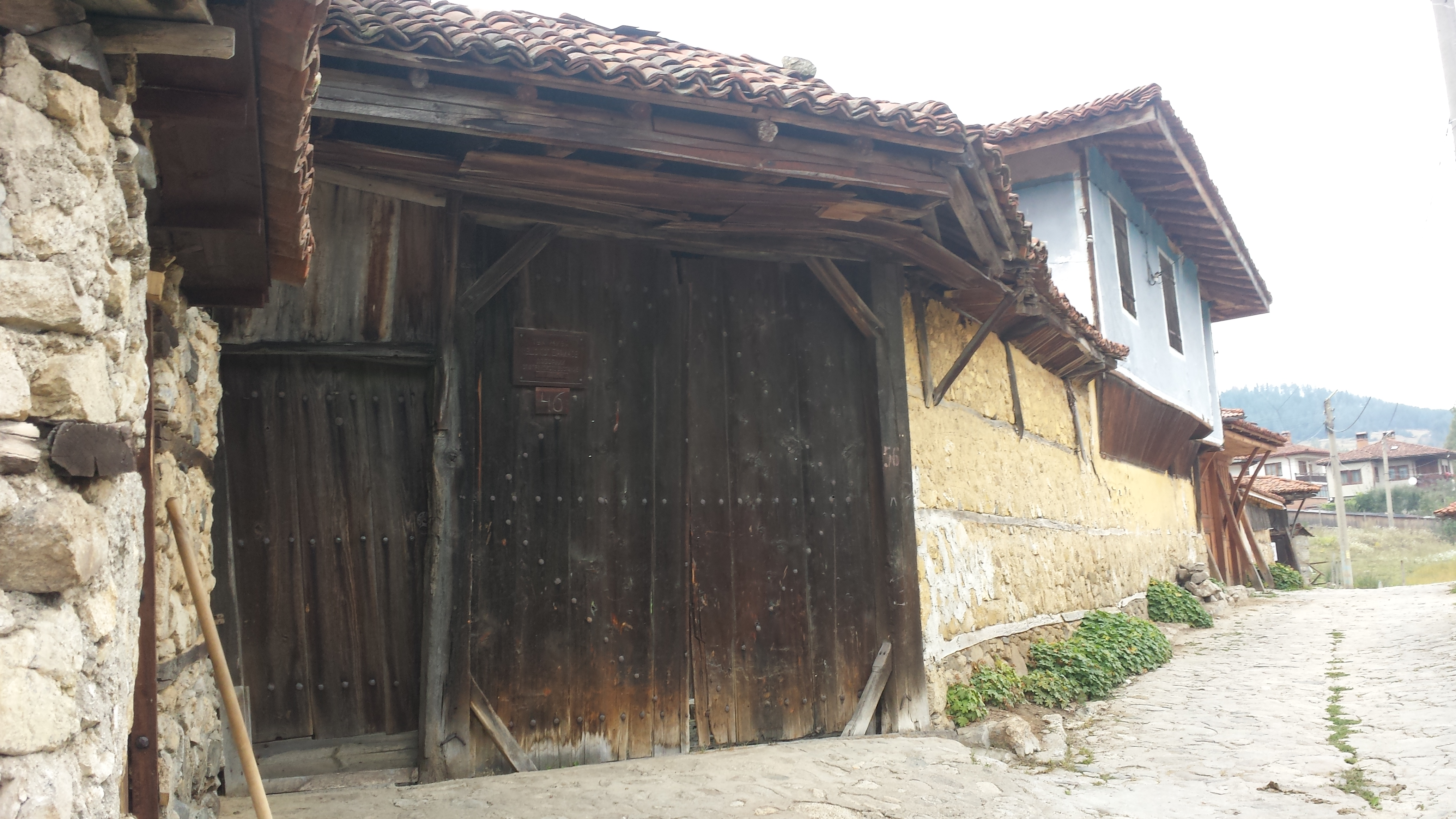 В Копривщица